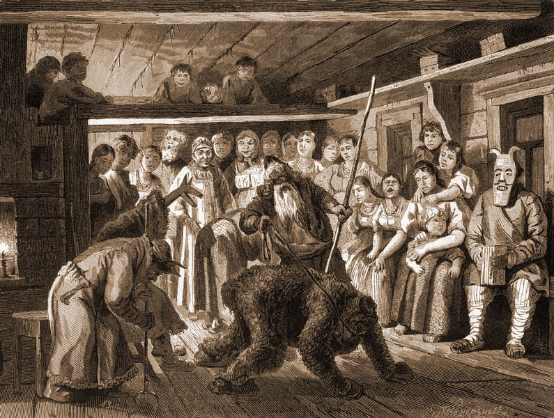 П. Каверзнев. Ряженые (медведь, дед-поводырь, старуха, коза, ряженый в маске с гармошкой)